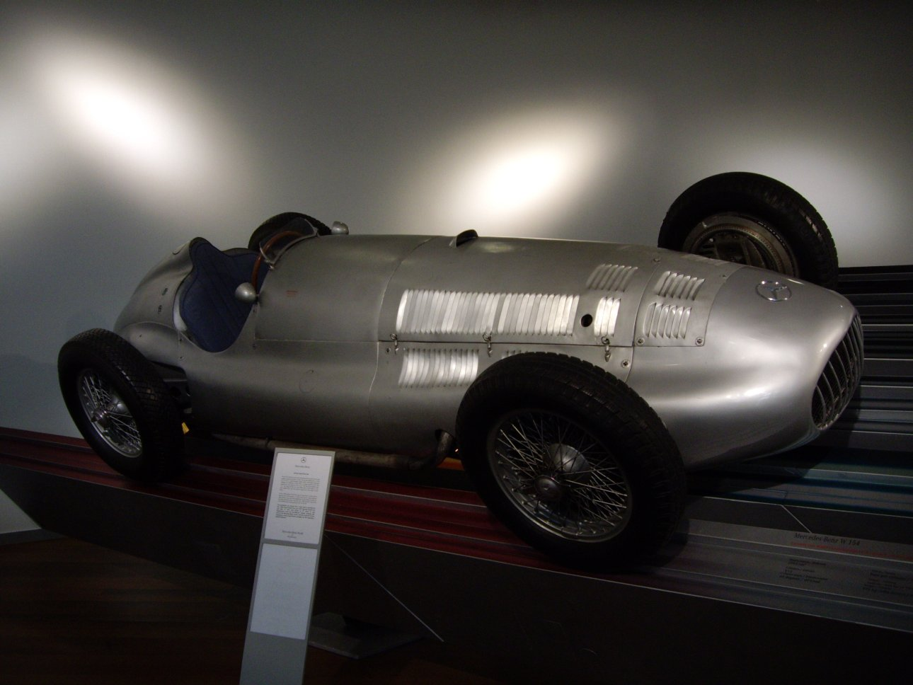 Mercedes Benz W154 Grand Prix car